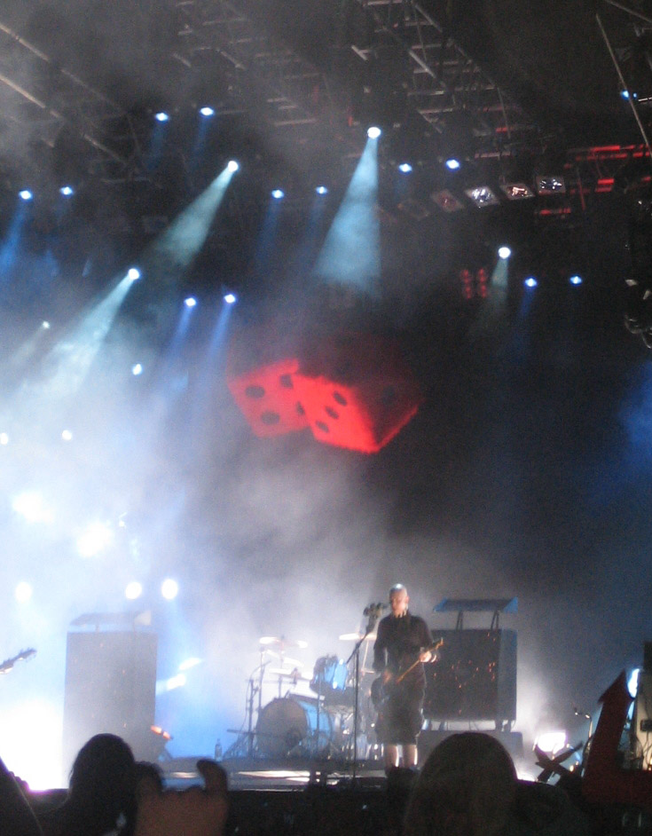 Apulanta, Raumanmeren juhannus 2006, Finland.